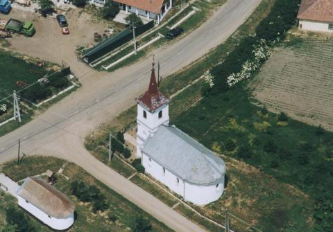 Komlódtótfalu, Hungary, aerial photography